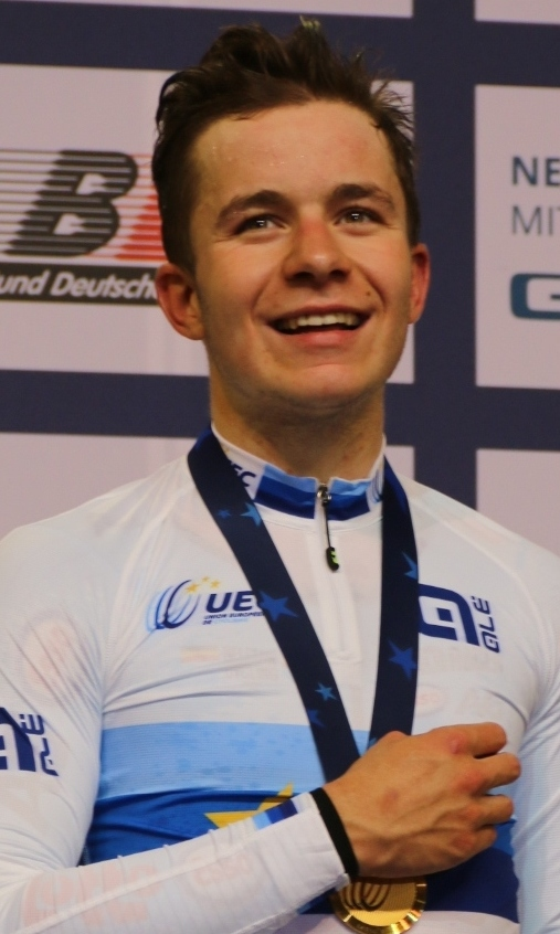 Gerben Thijssen, Europameister im Ausscheidungsfahren